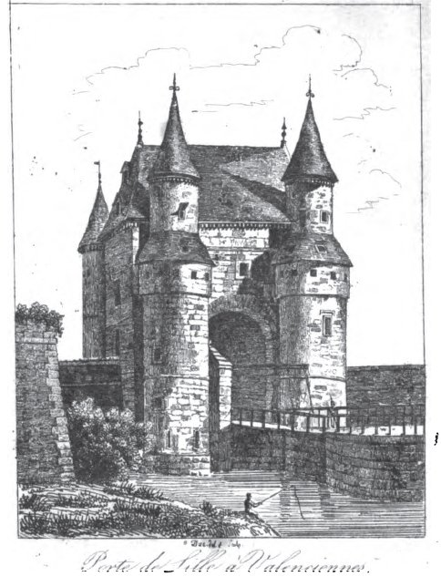 Porte de Lille à Valenciennes (La France pittoresque de A. HUGO - 1835), d'après un dessin de 1817 annoté Goblain del. voir.